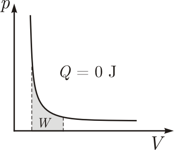 znázornenie práce v diagrame adiabaty Licensing